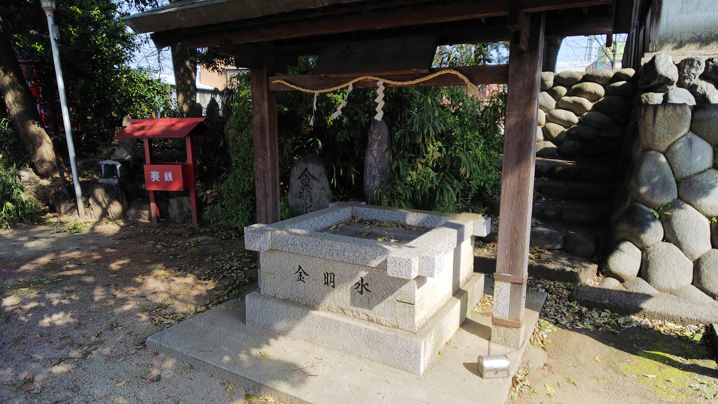 現存する金明水址